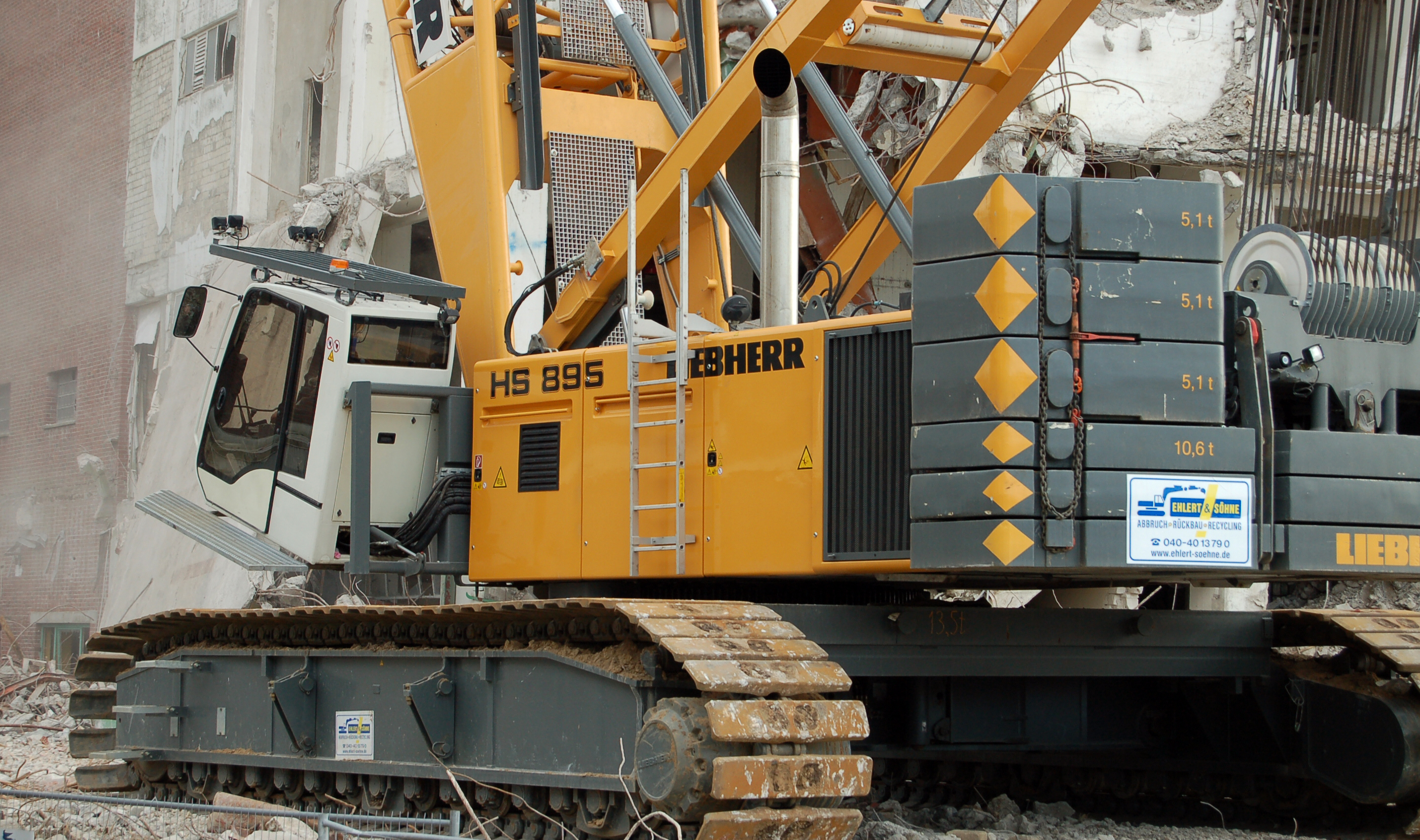 Liebherr HS 895 in Uetersen ca. 280 Tonnen Gesamtgewicht, Auslägerlänge 85 Meter .